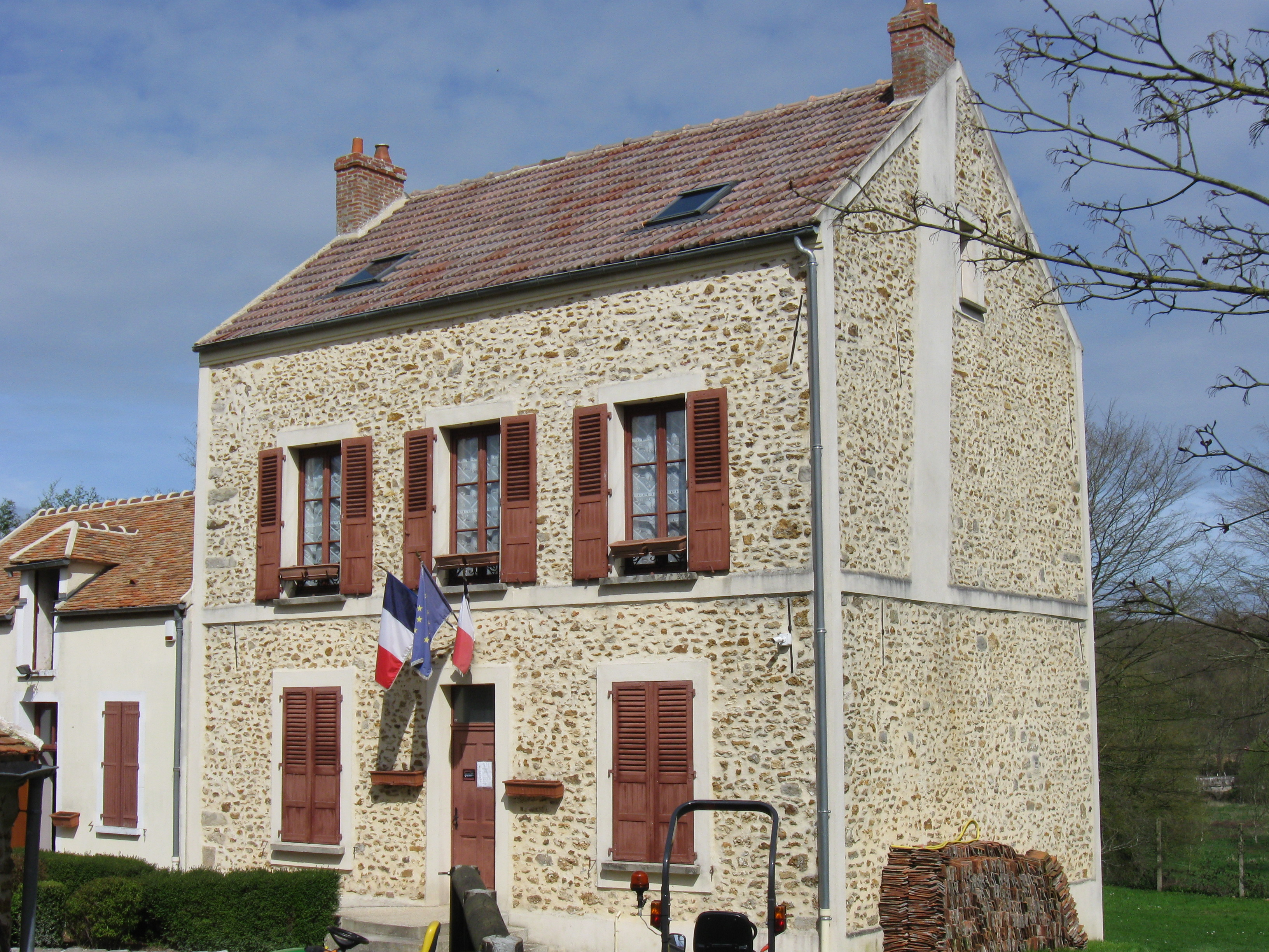 Mairie d'Argentières. (Seine-et-Marne, région Île-de-France).